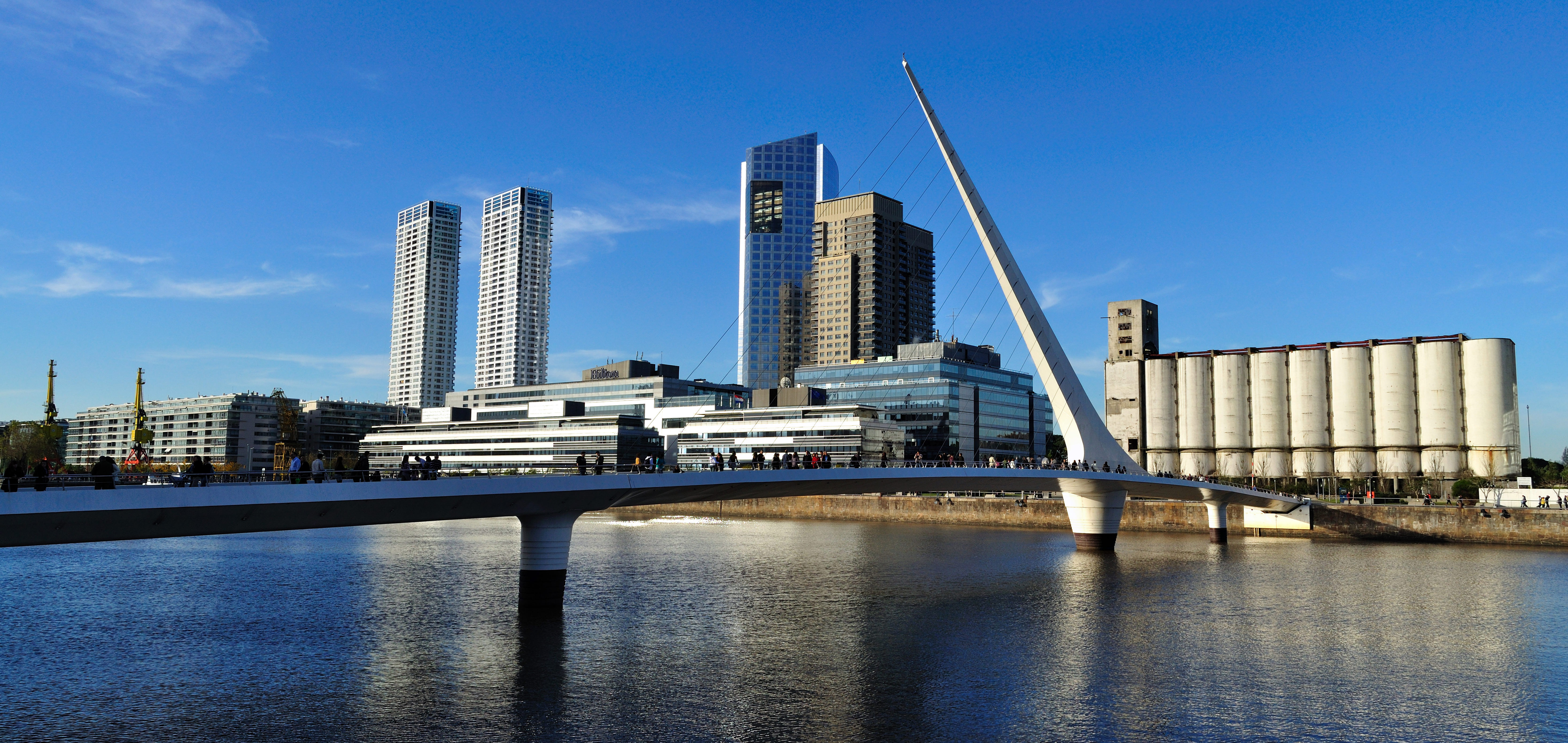 Puente de la Mujer - Puerto Madero